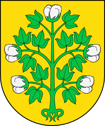 De oro, una planta de algodón de sinople, con cinco flores de plata